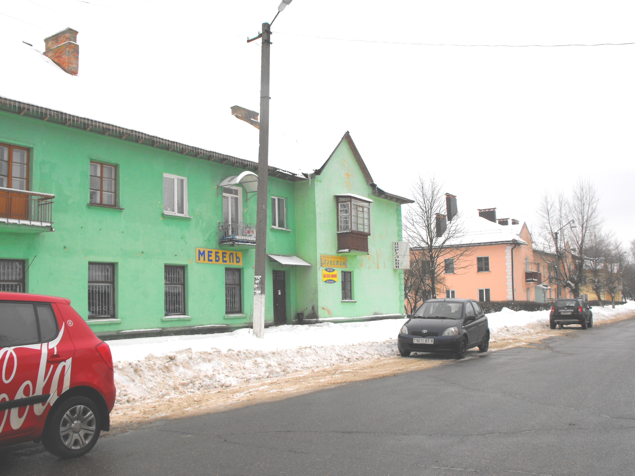 Во дворах этих домов (до войны - квартиры офицерского состава военной части) происходили массовые убийства евреев Осиповичского гетто. Находятся в квартале, ограниченном улицами Социалистической и Рабоче-крестьянской.